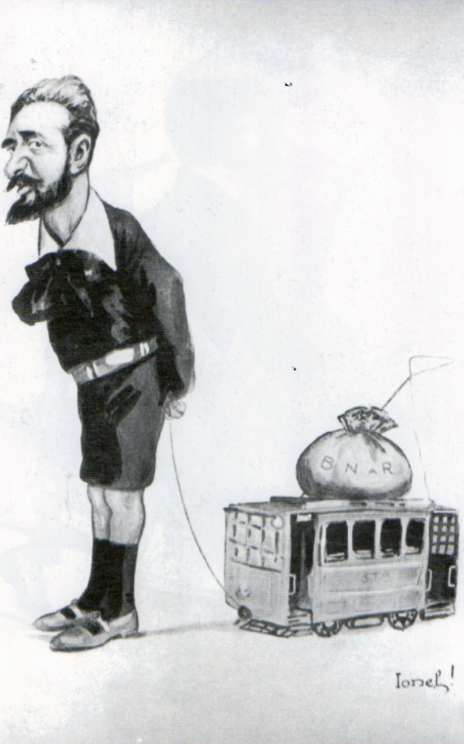 Ionel Brătianu. Caricatură din Albumul meu.